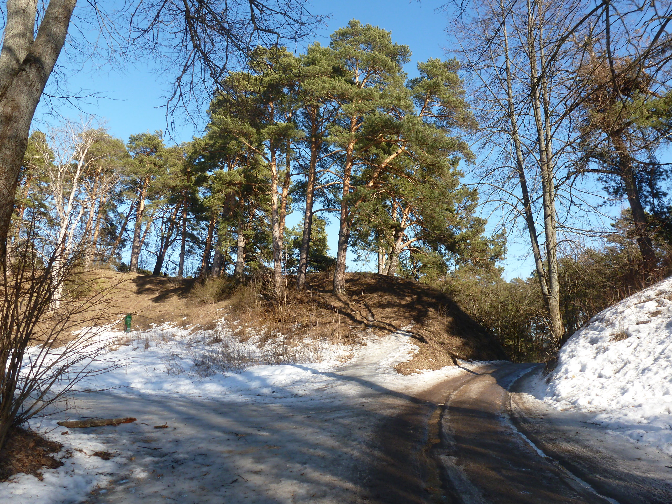 Городок (Звенигород), вал кремля. Март 2015 года